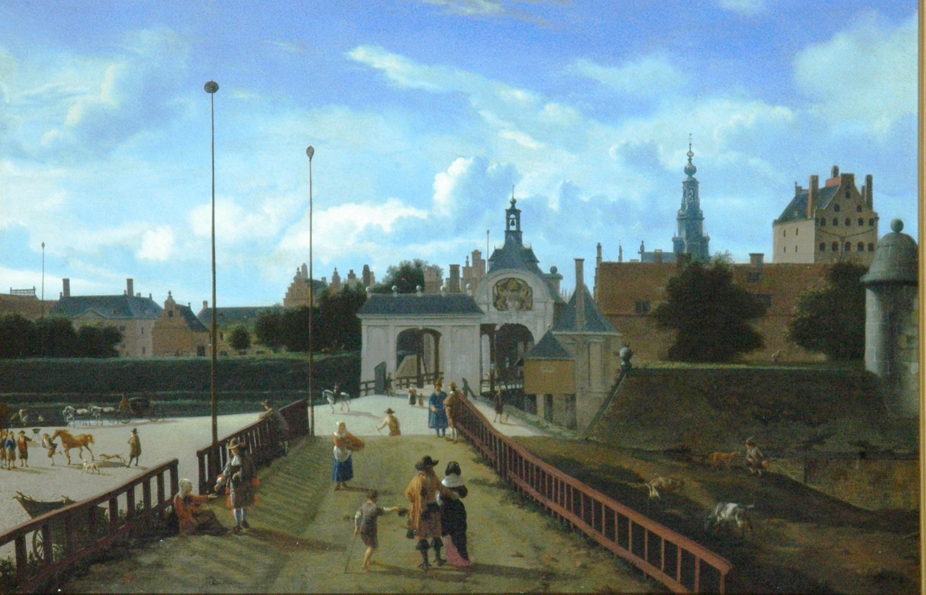 De tweede Sint Anthoniespoort, tussen de huidige Nieuwe Herengracht en het Mr Visserplein, door Jan van der Heyden.